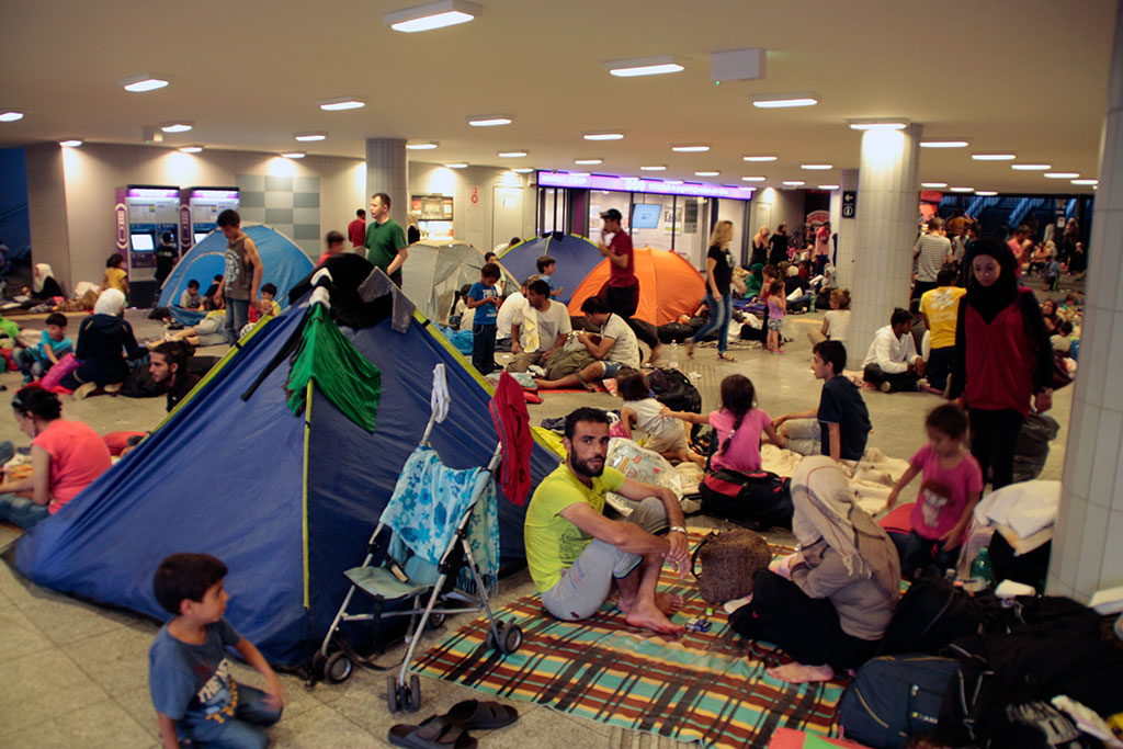 TRANSIT ZONE. Menekültek a Keletinél, Budapest, 2015. szeptember 2-5.